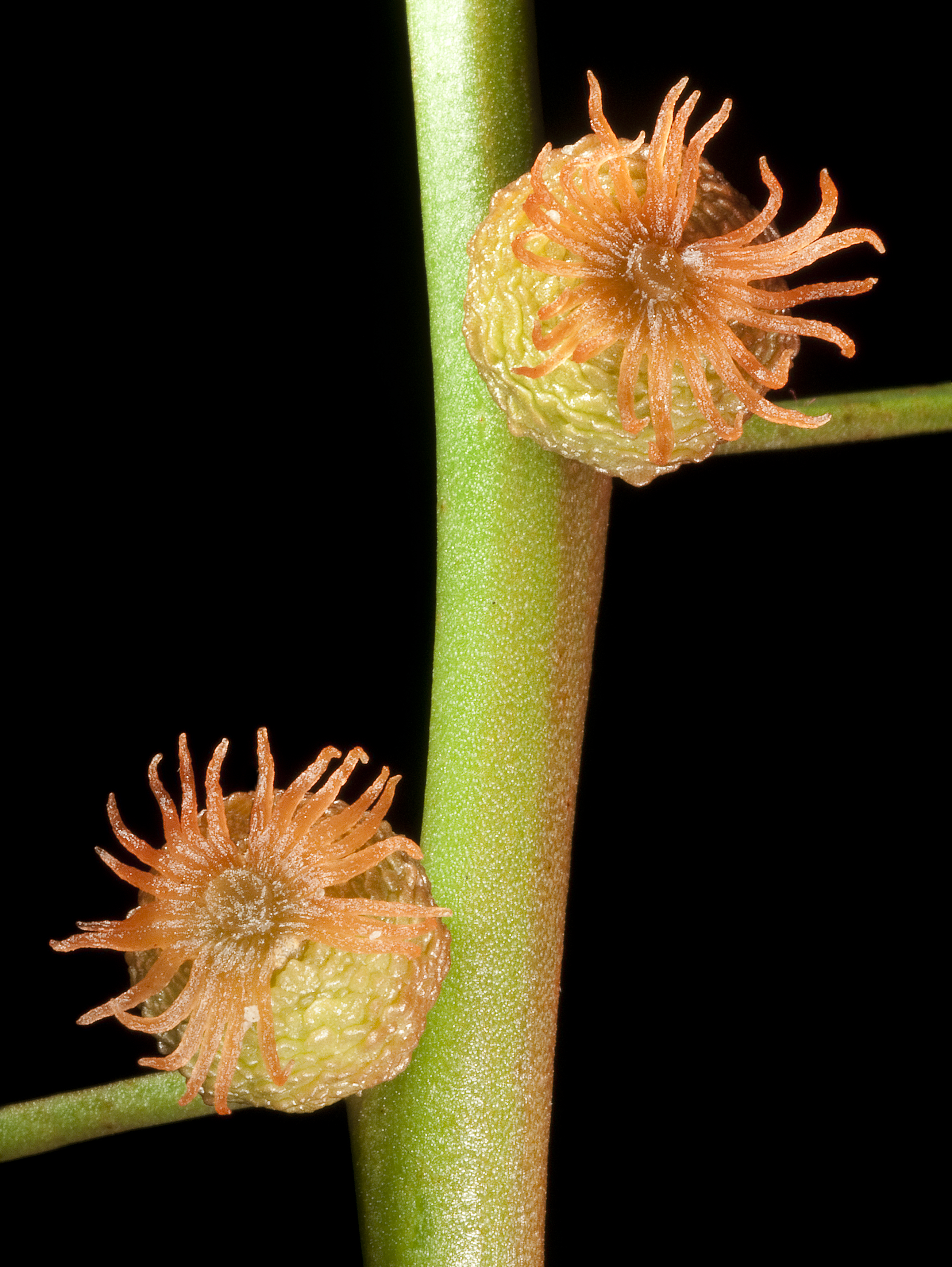 KRT4622